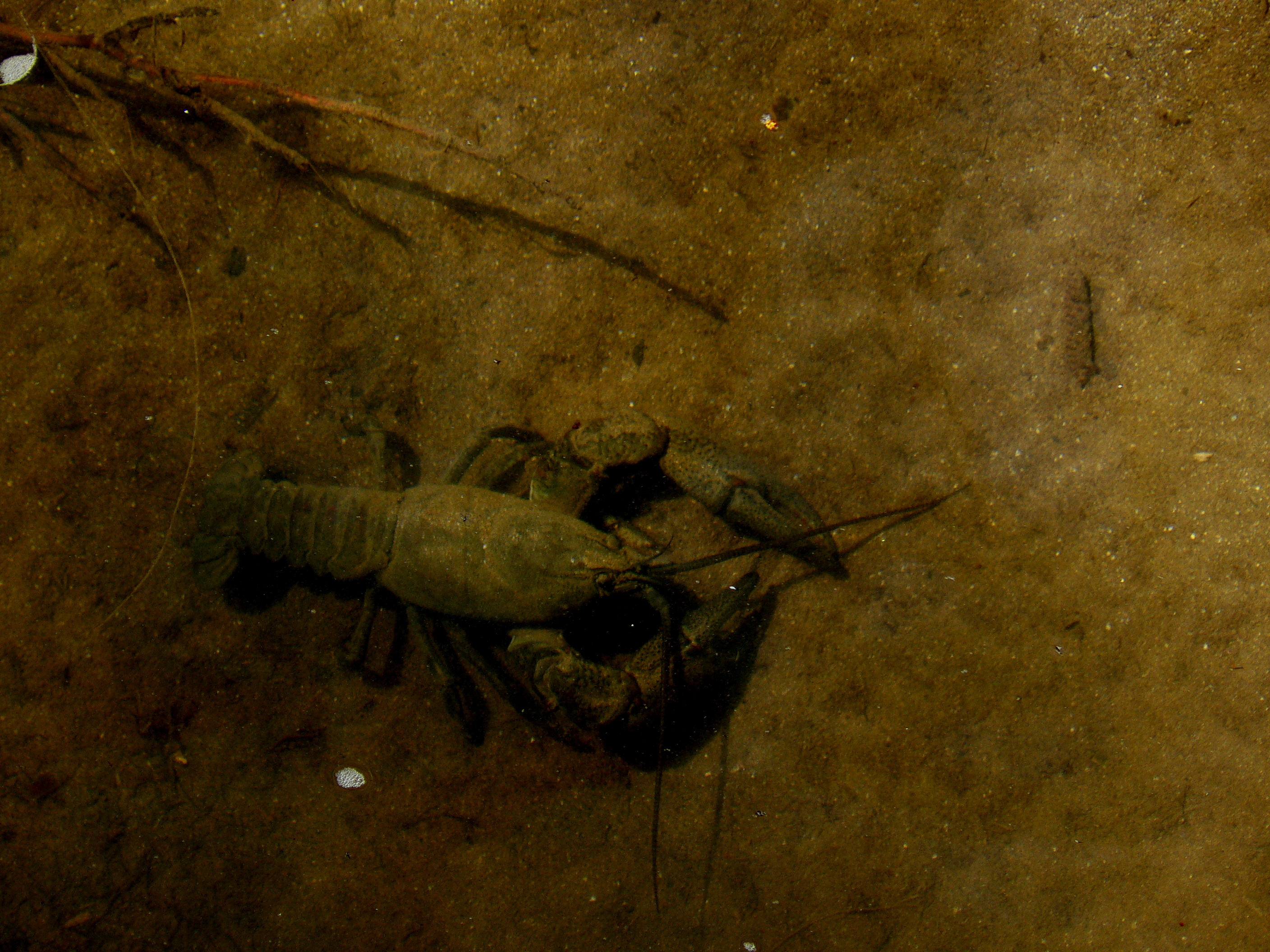 Potočni rak v Črnušnici